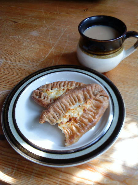 Karjalanpiirakat, leivinuunissa paistettuja. Maitokahvi Kermansavi-kupissa.